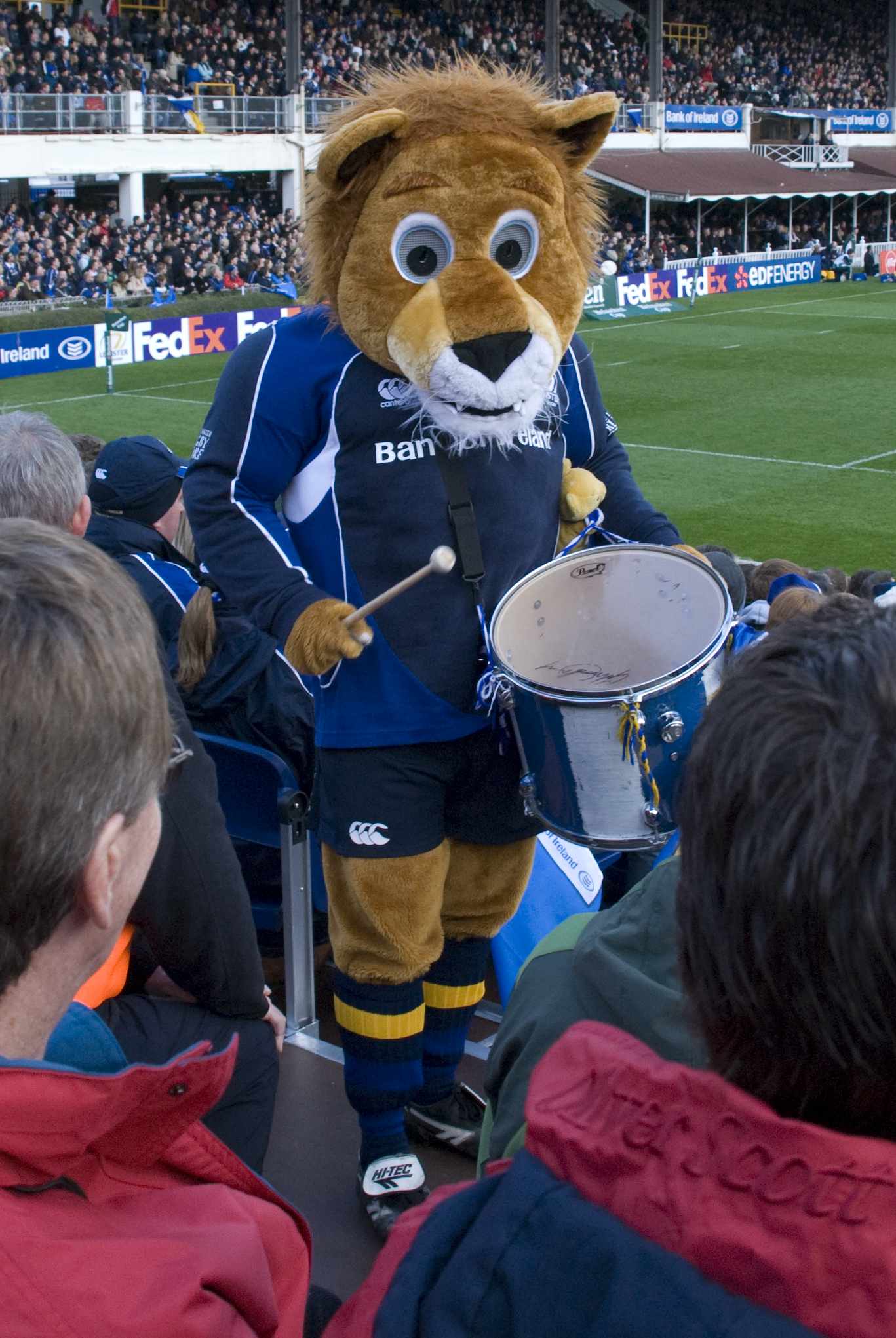 The Leinster mascotte des Leinster Rugby - Leinster Rugby vs Leicester Tigers